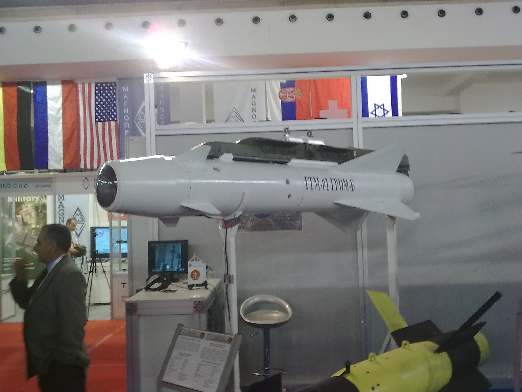 Нова ракета Гром Б на сајму наоружања